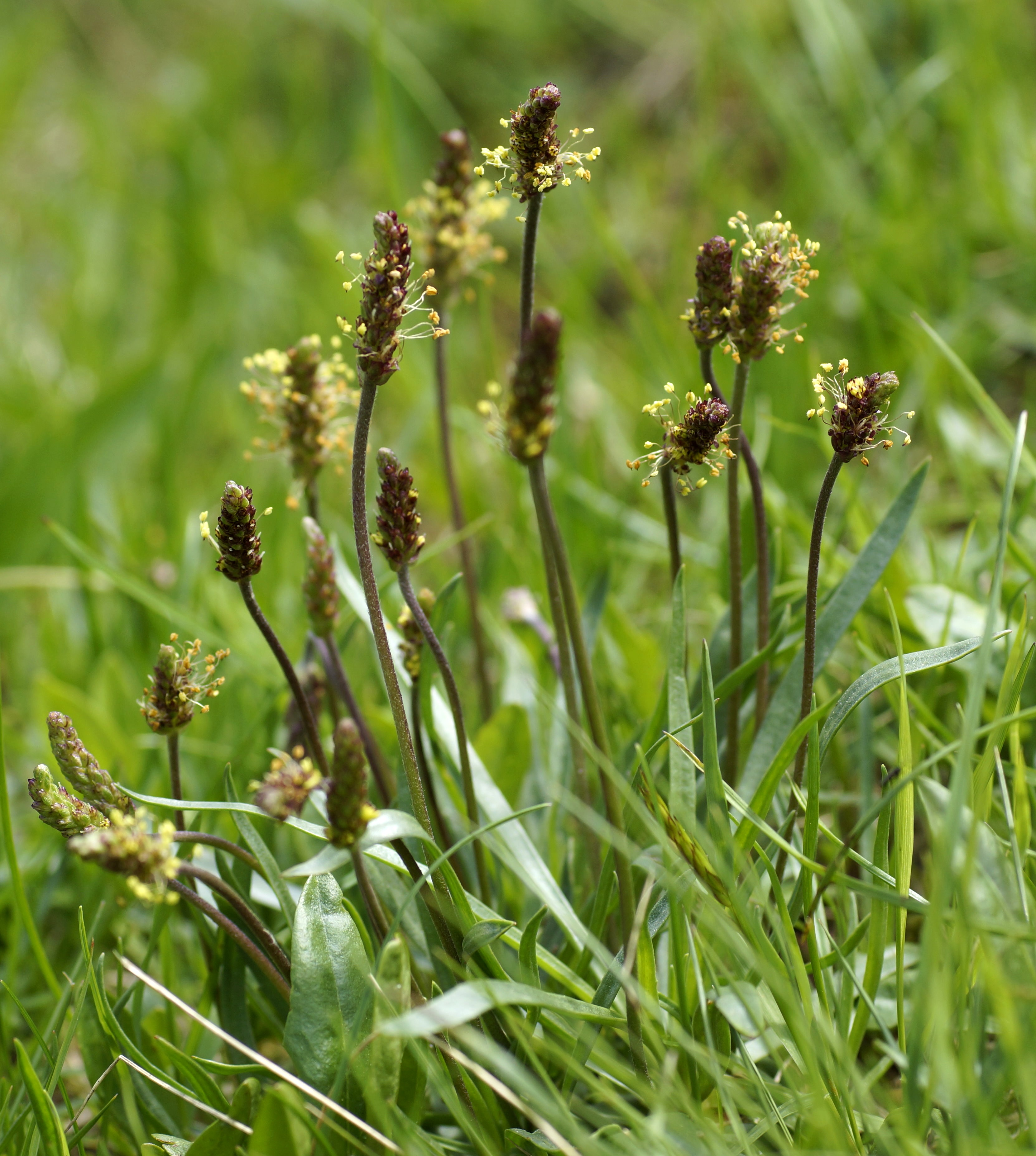 Alpen-Wegerich, Plantaginaceae Oesterreich, Kleinwalsertal, Riezlern, Kanzelwand, 1800 m Photo: U.Schmidt, 12.VII.2013